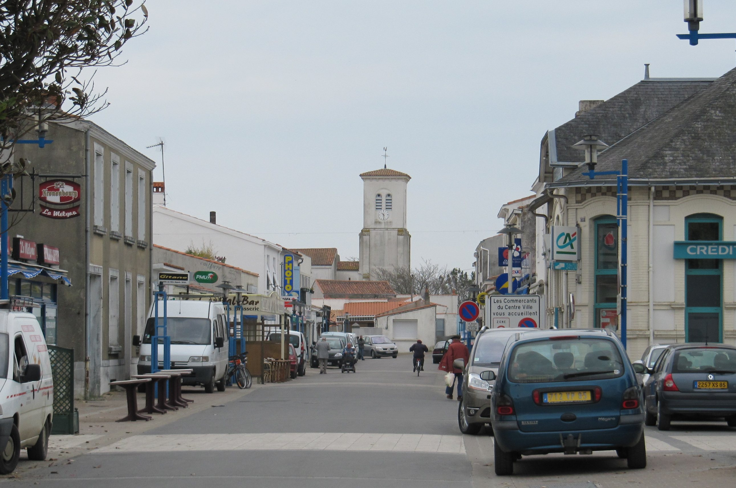 rue commerçante principale de l'Aiguillon-sur-Mer en avril 2010.